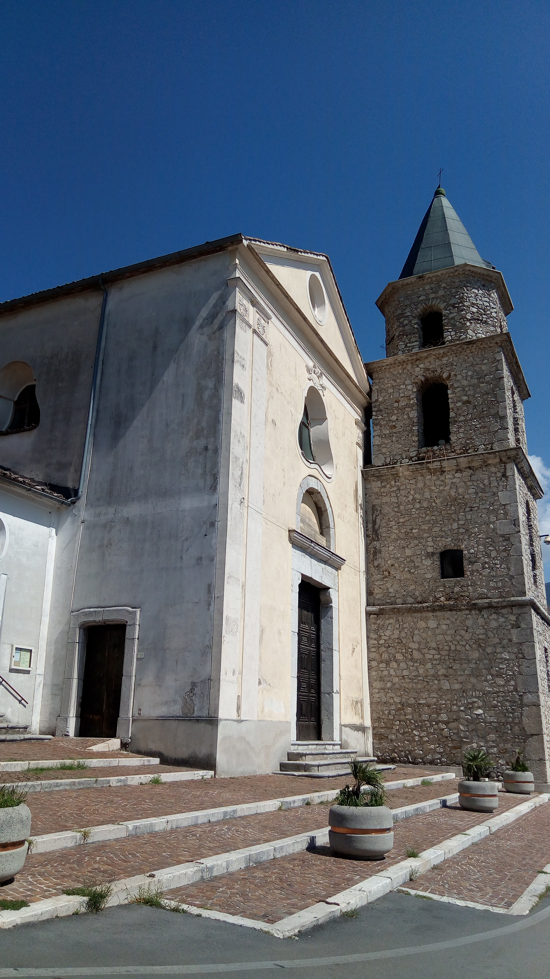 Solofra, chiesa di Sant'Andrea Apostolo.